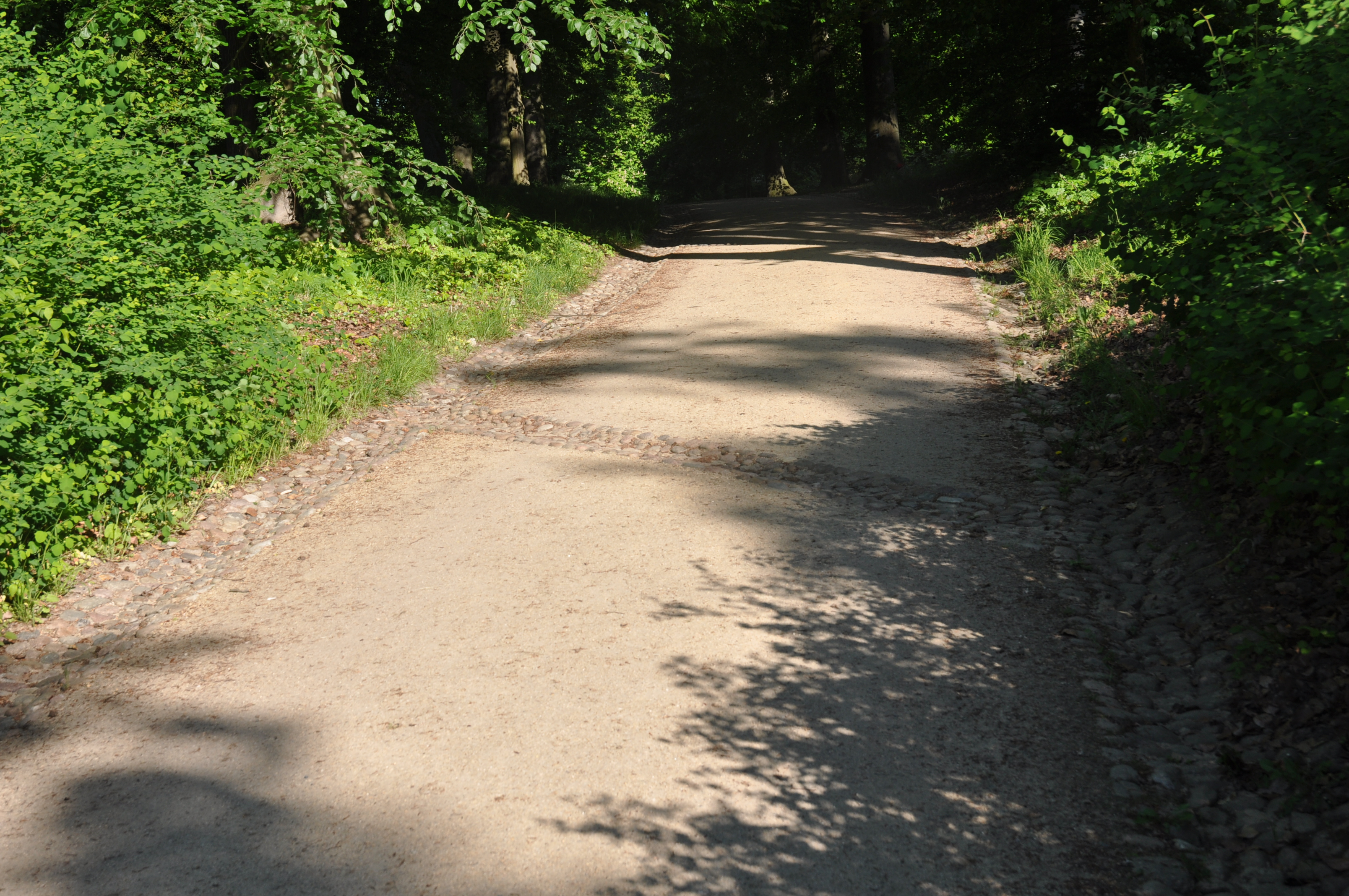 Denkmalpflegerisch wiederhergestellter Fahrweg